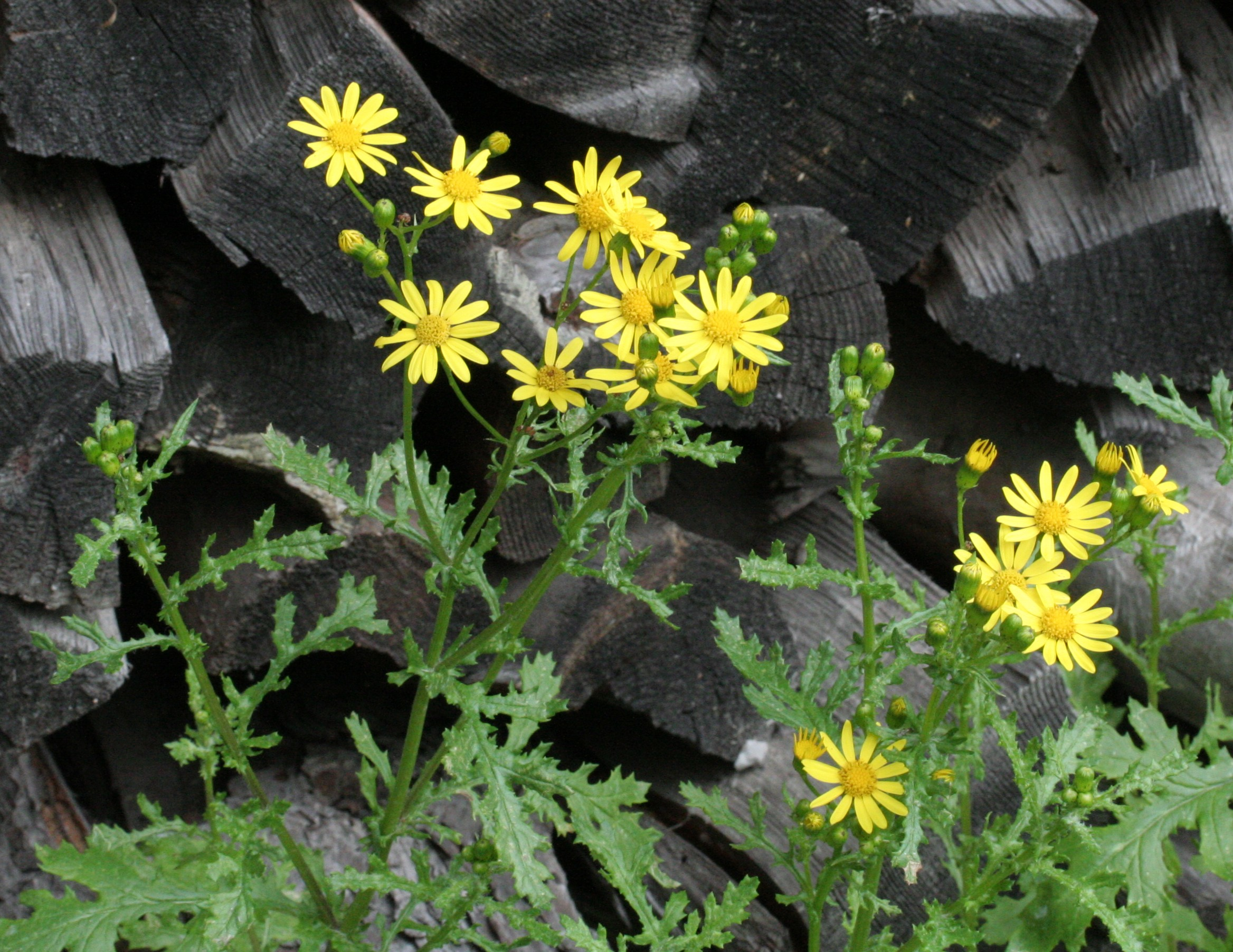 Senecio montanino - Cima Sappada, Sappada (BL), 1290 m s.l.m.